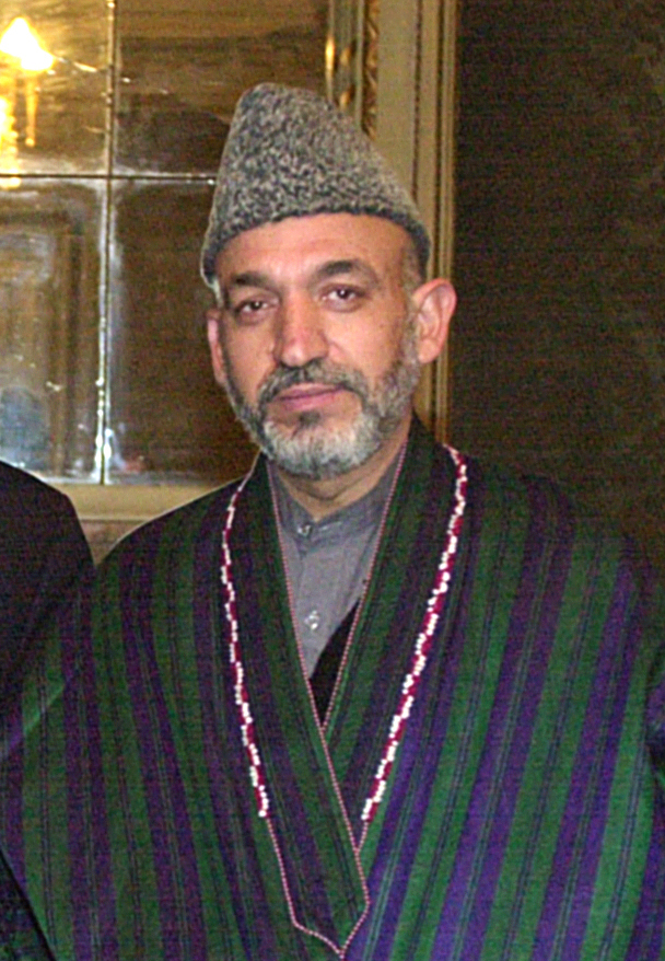 Afghan Interim Chairman Hamid Karzai in 2002